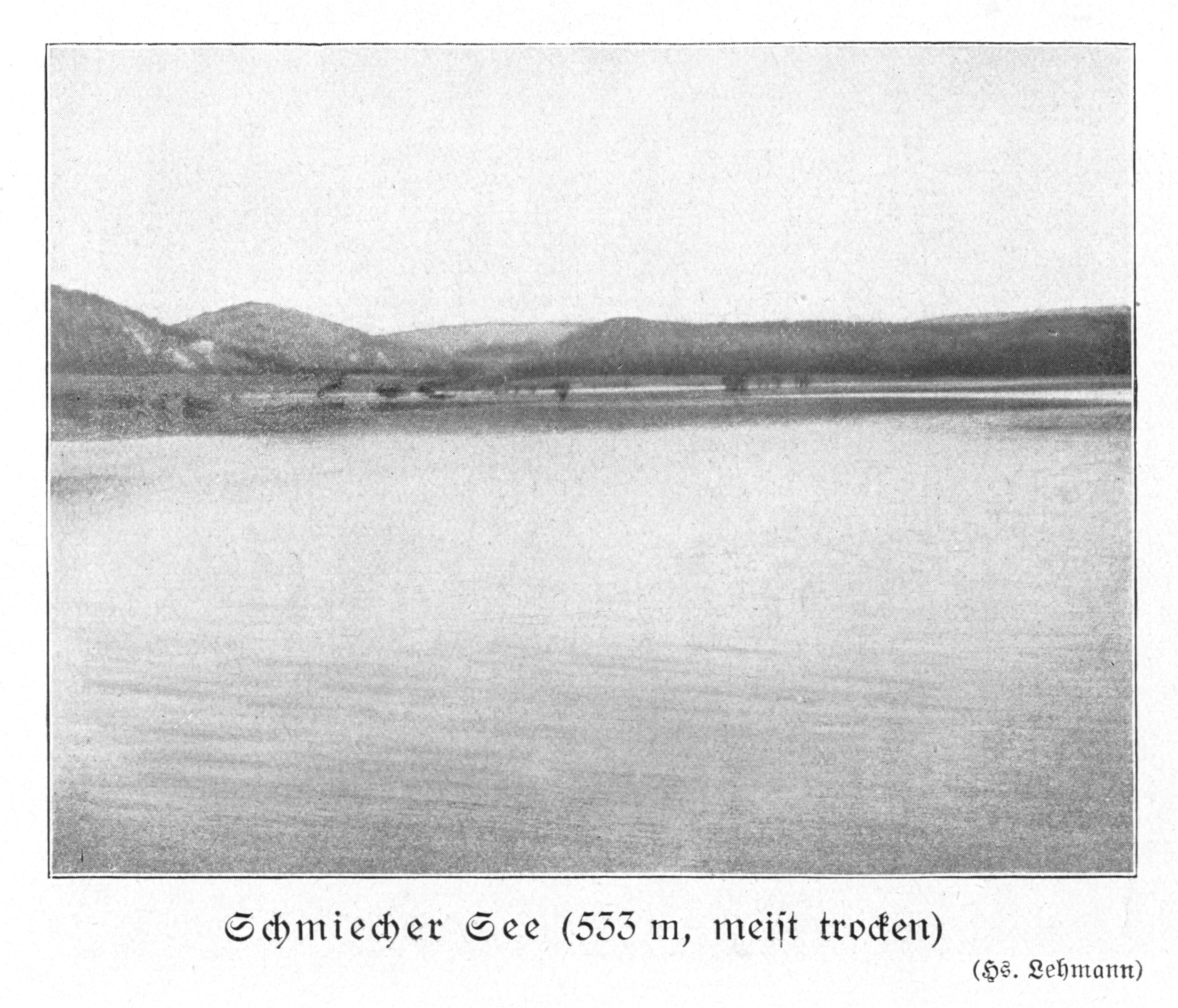 Schmiecher See (533 m, meist trocken)